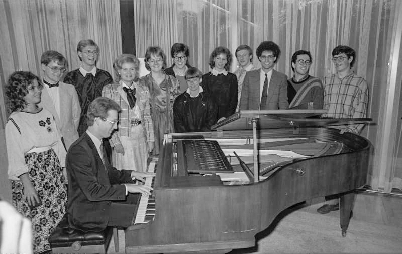 12.11.1986 Hannelore Kohl, die Frau des Bundeskanzlers, begrüßt die Preisträger des Deutschen Musikwettbewerbs 1986 im Kanzlerbungalow.